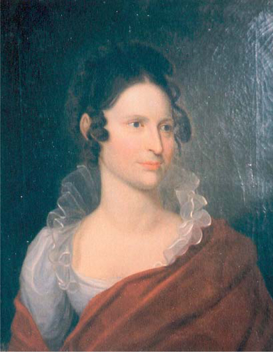 Porträt von Charlotte Christiani geb. Heine (1813 - 1869), Kusine des Dichters Heinrich Heine (1797-1856) und Ehefrau des Lüneburger Juristen, Politikers und Revolutionärs Dr. Carl Rudolph Ferdinand Christiani (1797-1858), gemalt von Nikolaus Peters (1795-1875), ca. 1830. Privatbesitz der Familie Lindhorst in Hamburg.